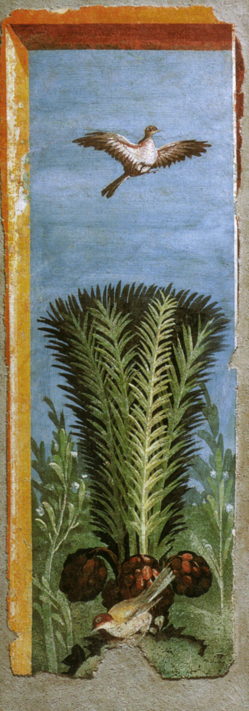 Pannello di pittura parietale da area vesuviana, miho museum, shiga